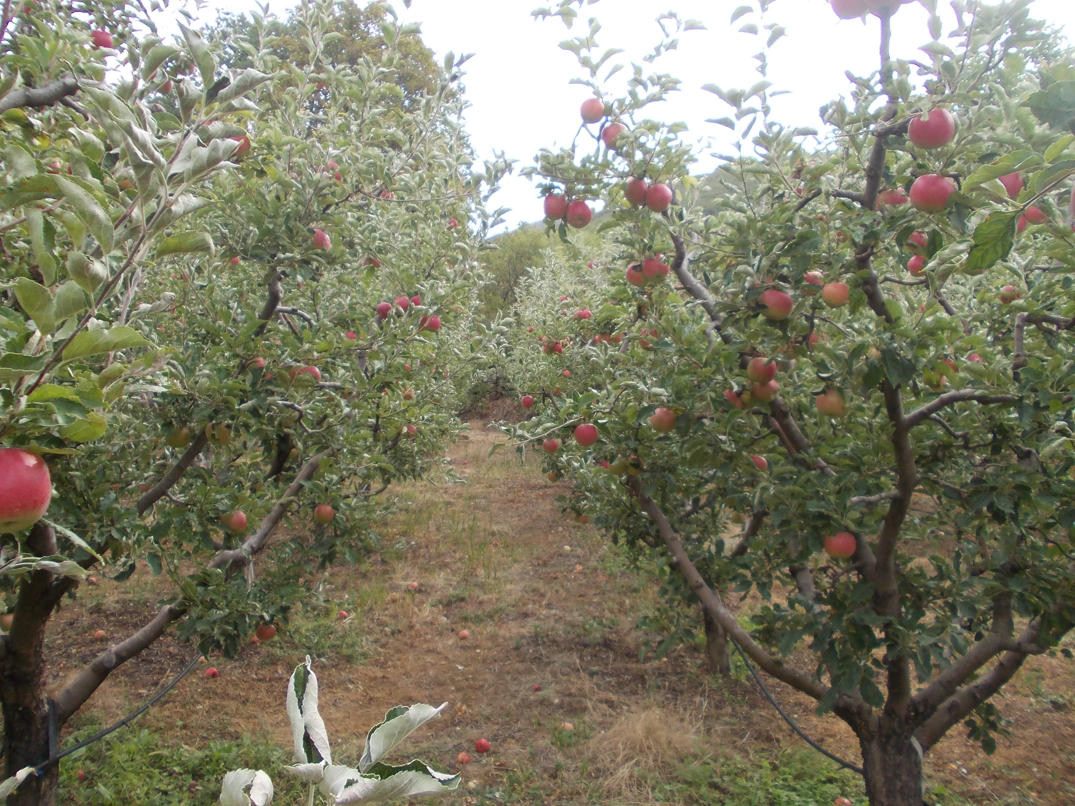 Слики од трета група на викикамп во Брајчино